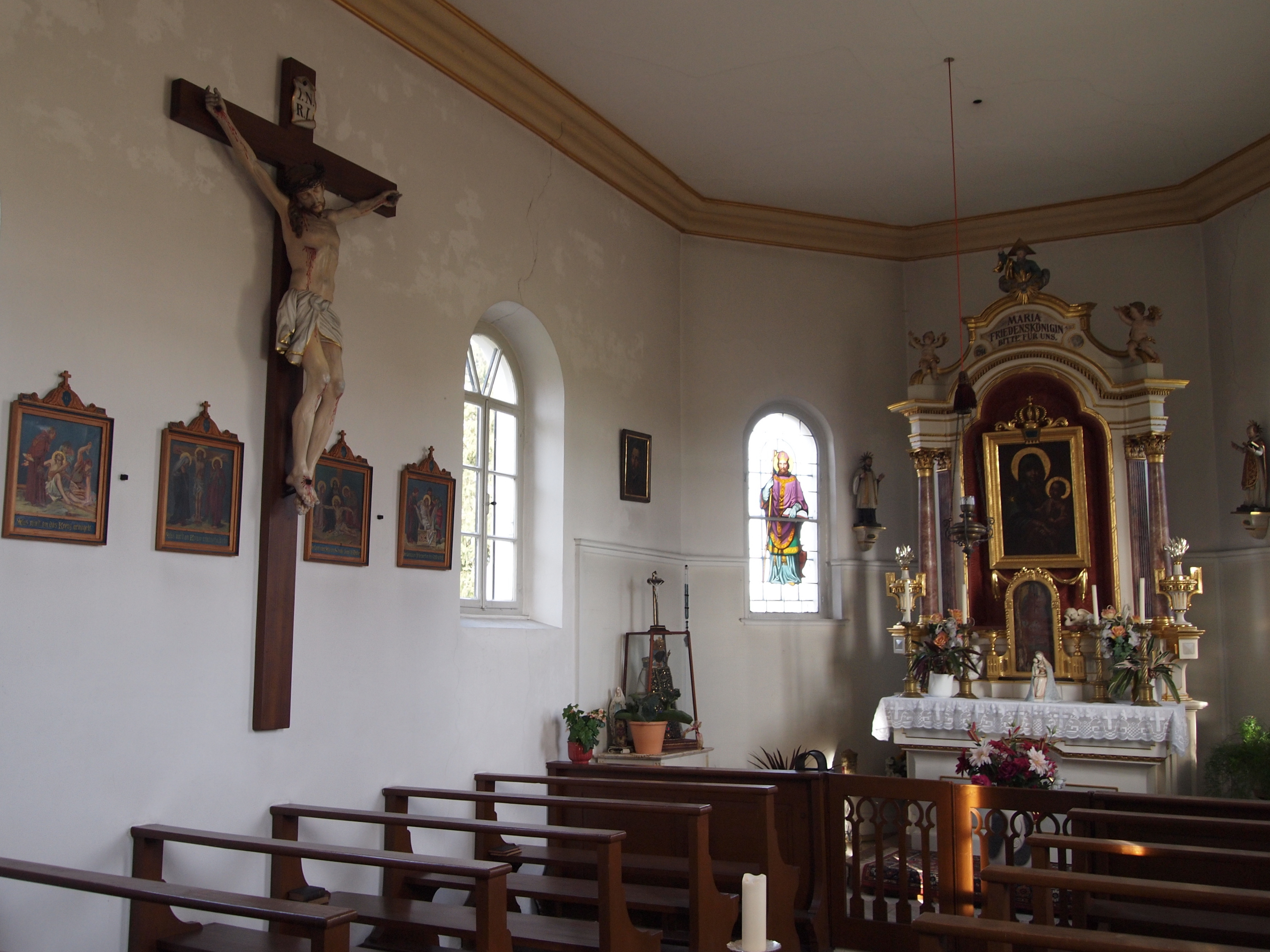 Kapelle Maria Schnee, Mindelheim, Im Eichet 27 (an der Straße nach Mindelheim); Innenraum